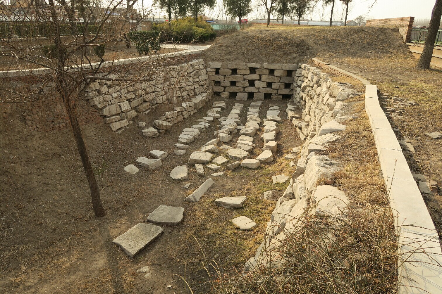 臨淄齊國故城三號排水口遺址，位於東周臨淄大城之西北角，在今山東省淄博市臨淄區齊都鎮西北。